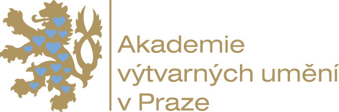 Symbol AVU